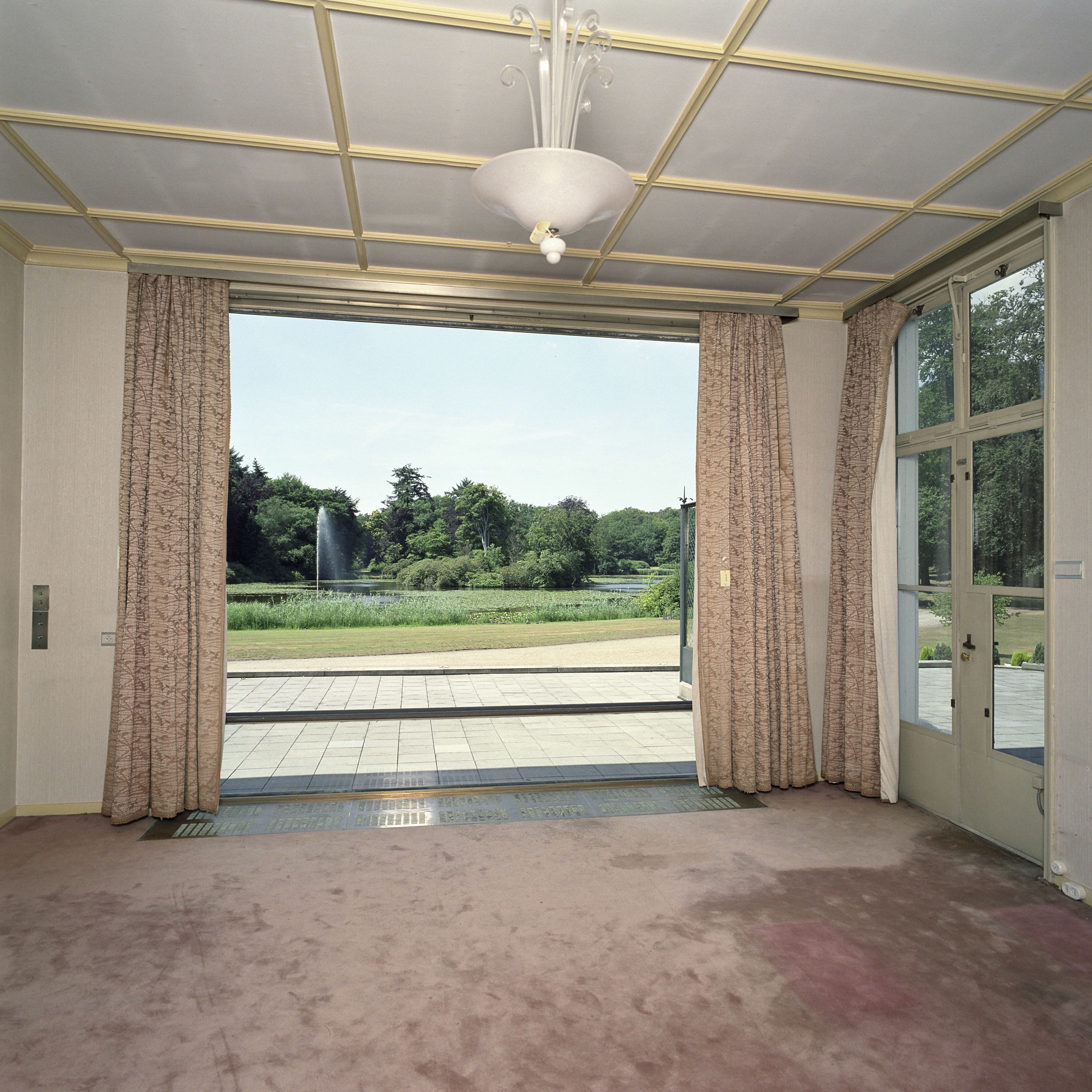 Paleis Soestdijk: Interieur, overzicht van de lege zit/werkkamer van Koningin Juliana met raamconstructie en met zicht op het terras en park, gelegen aan de achterzijde van het corps de logis